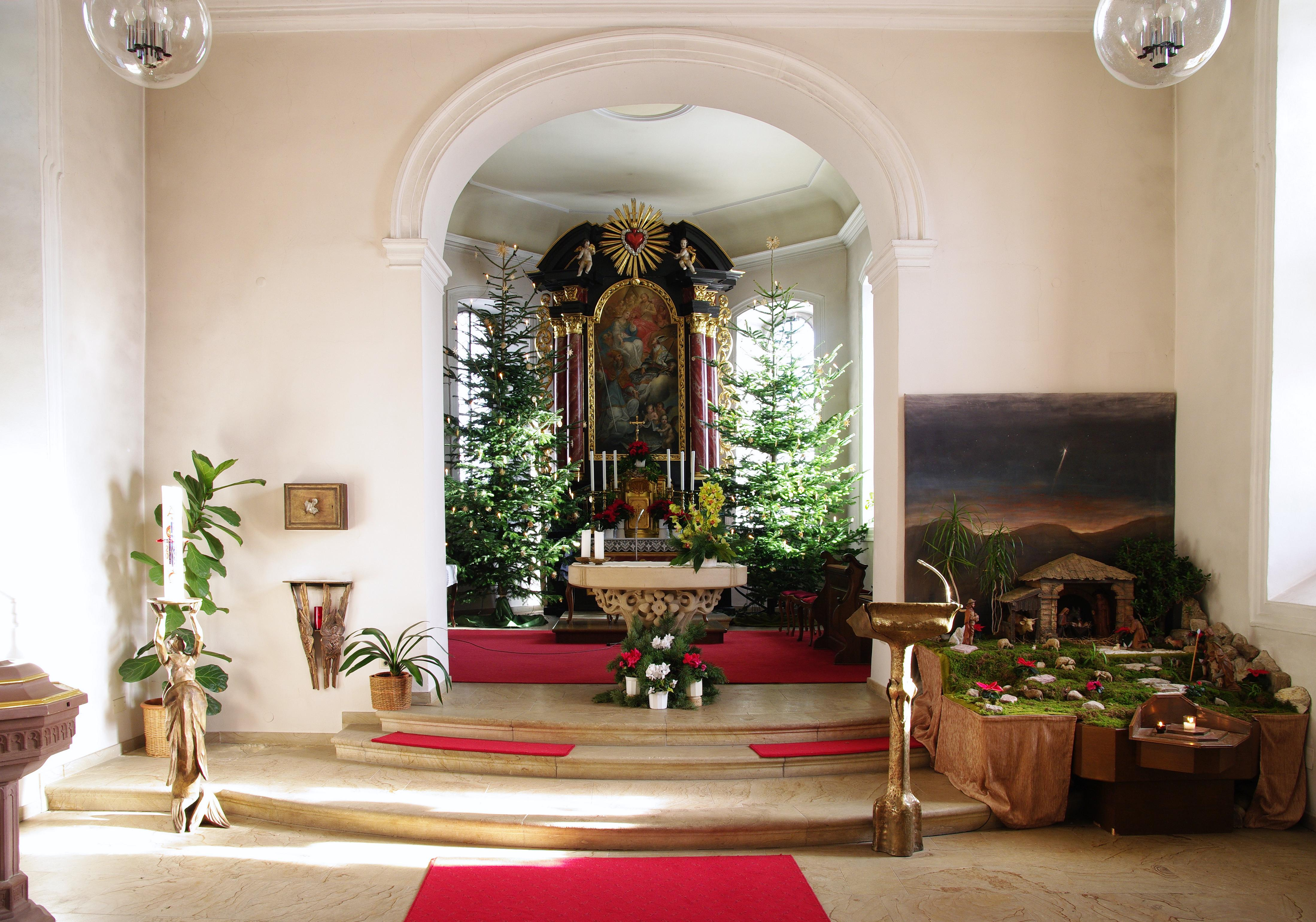 St. Hilarius